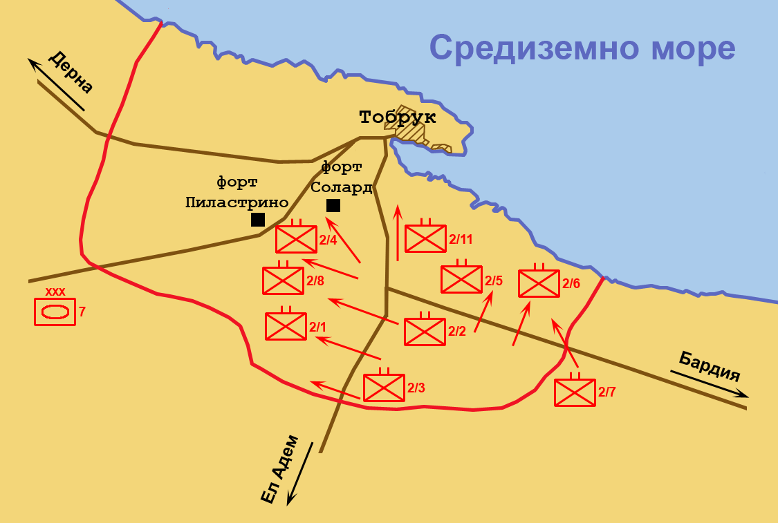 Атаката срещу Тобрук. Фаза първа, част втора.